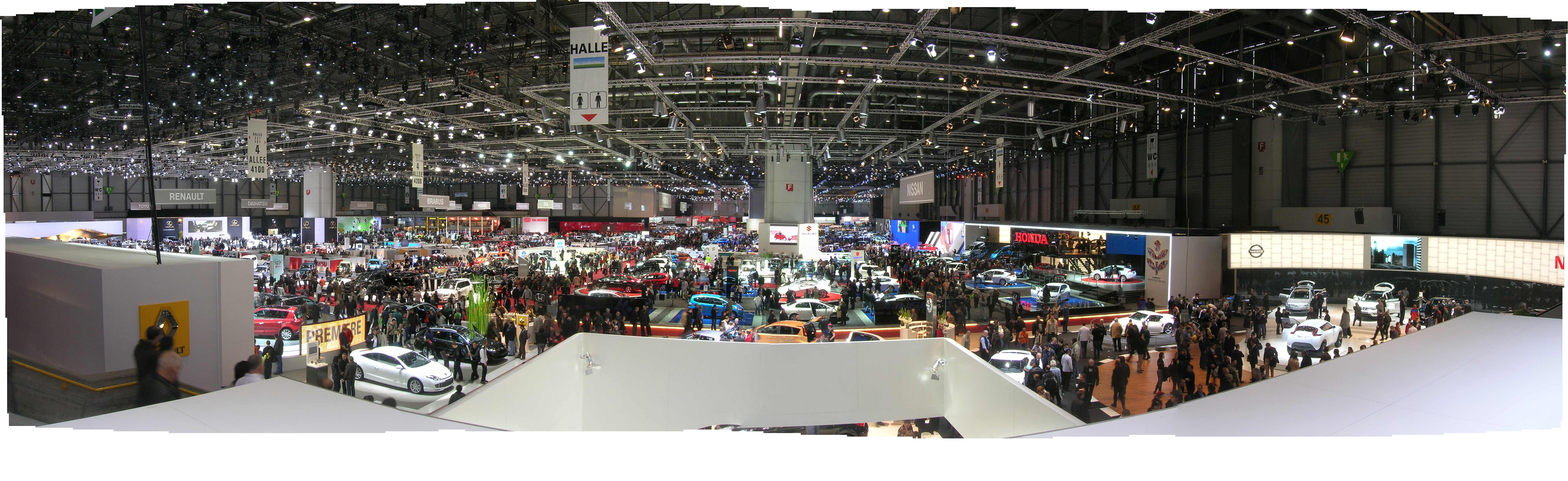 Panorama vom 79. Genfer Auto-Salon, Übersicht von Halle 4